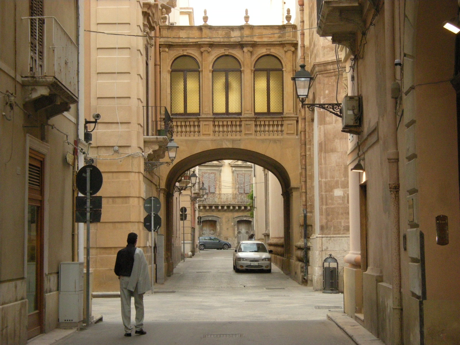 Rua de Trapani - Palazzo vescovile (particolare)